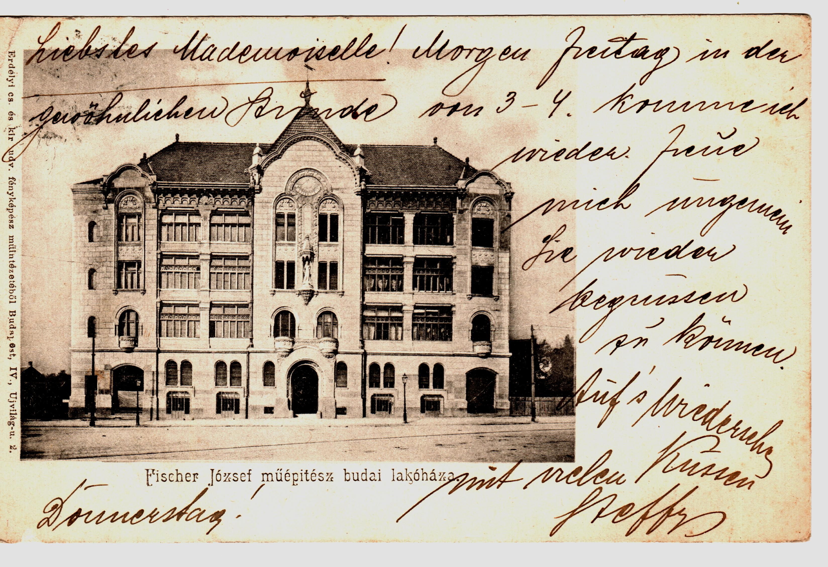 A képeslapot 2012. szeptember 23-án szkenneltem A páratlan szám alatti képet követő páros szám alatti kép a képeslap hátsó oldala. PD-old. Fischer József műépítész budai lakóháza, amely elkészültekor, 1910 előtt a Fehérvári út 49. (ma Móricz Zsigmond körtér 2.) alatti ház. Published under Creative Commons in the Metapolisz DVD line. All of the photos and vids in the Metapolisz DVD line are under Creative Commons and can be used even for commercial – for profit – purposes. Recommended Citation Derzsi Elekes Andor: Metapolisz DVD line Megjelent Creative Commons alatt a Metapolisz sorozatban. A Metapolisz sorozat valamennyi képe és filmje Creative Commons alatti valamint kereskedelmi - for profit - célra is felhasználható. Ajánlott hivatkozás: Derzsi Elekes Andor: Metapolisz DVD line